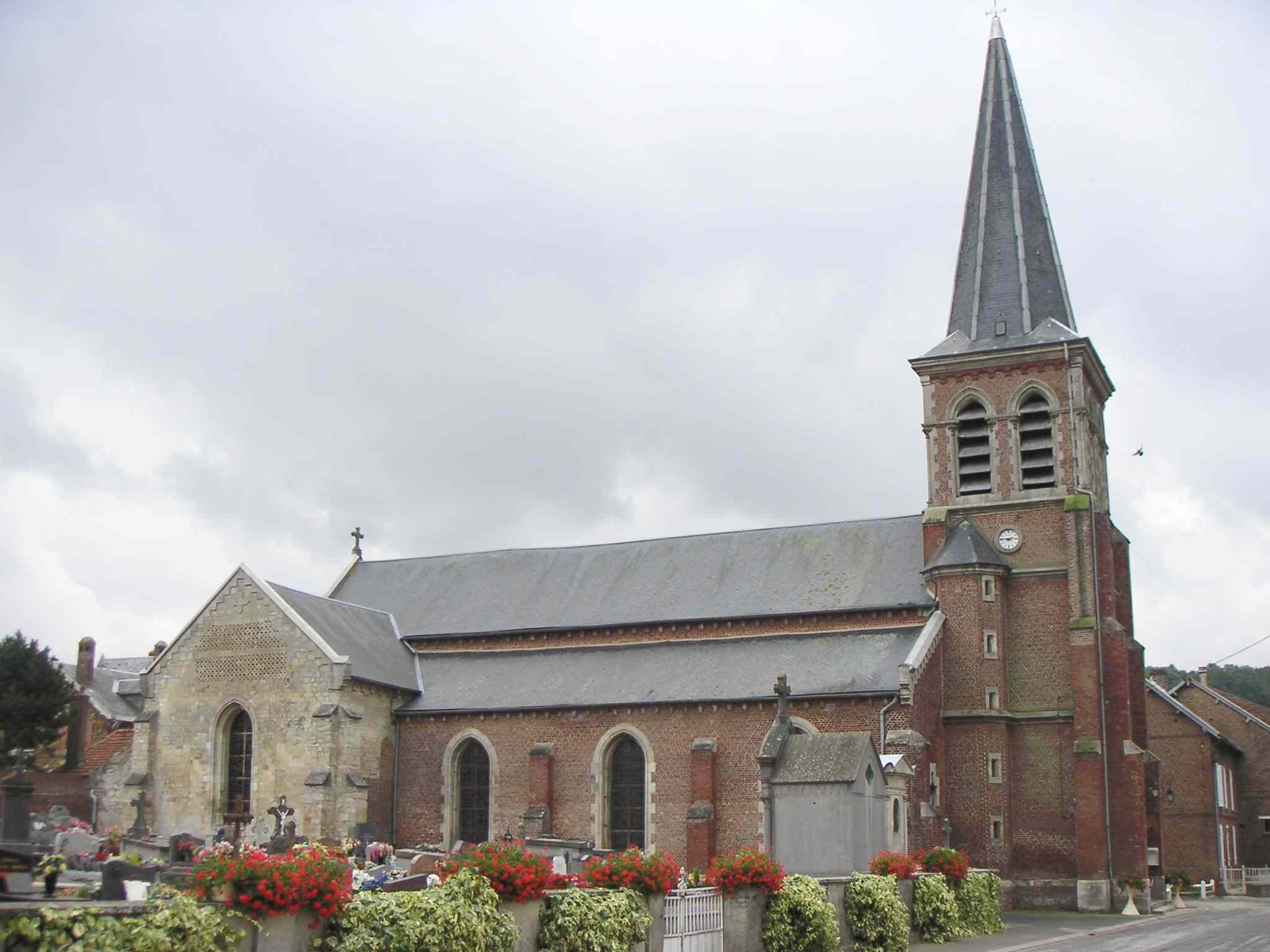 Cette photo de l'église de Tupigny (Aisne, France) a été prise par mes soins le 1er septembre 2005